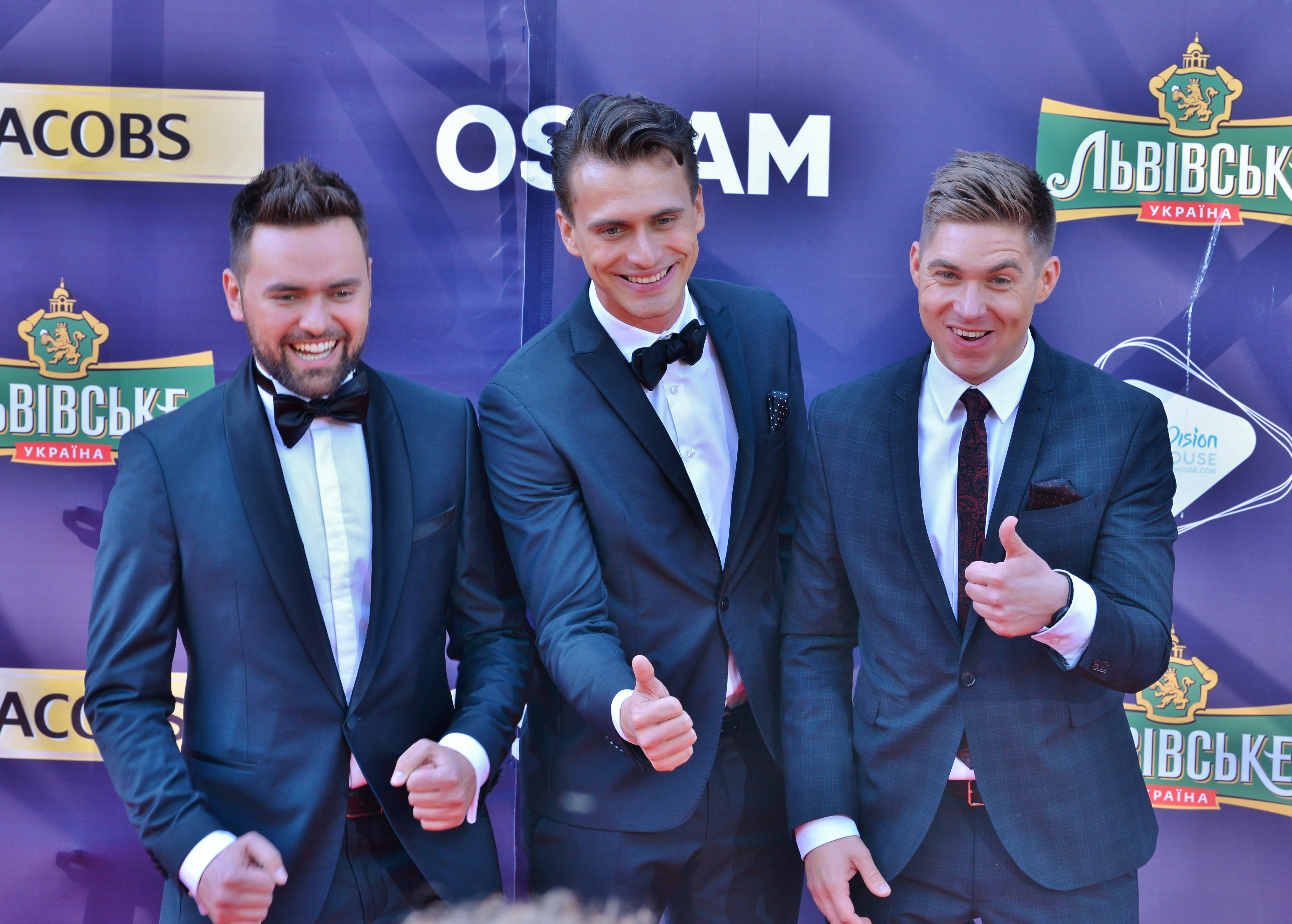 Українські ведучі концертів Євробачення Тімур Мірошниченко, Олександр Скічко та Володимир Остапчук на церемонії відкриття Євробачення 2017 у Києві